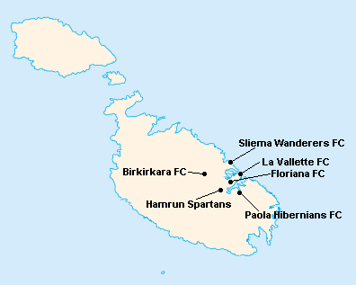 Répartition des clubs en First Division Maltaise 1965-1966.